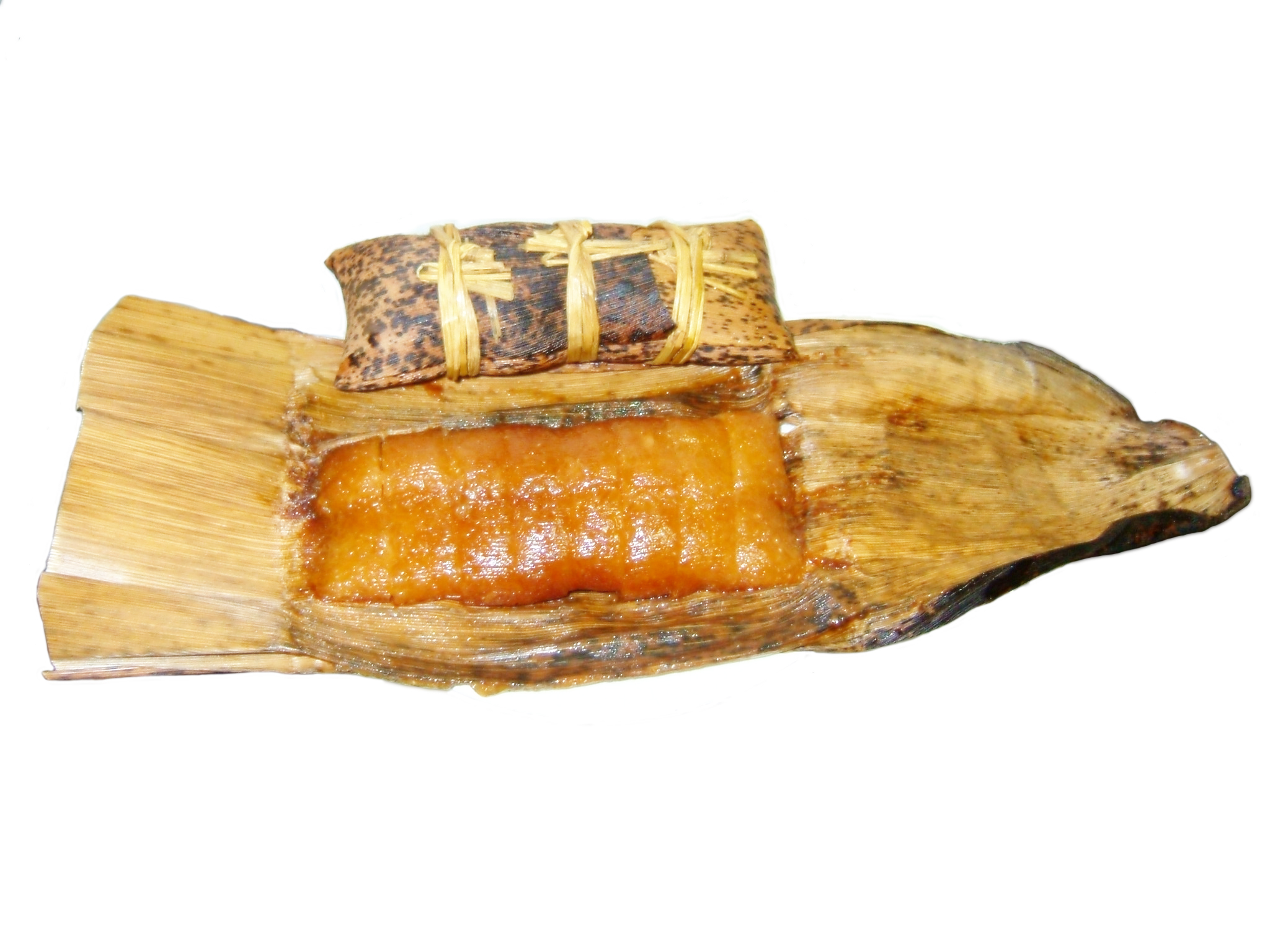 Akumaki